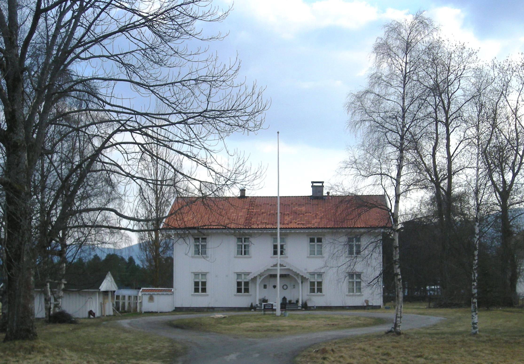 Moland prestegård i Fyresdal